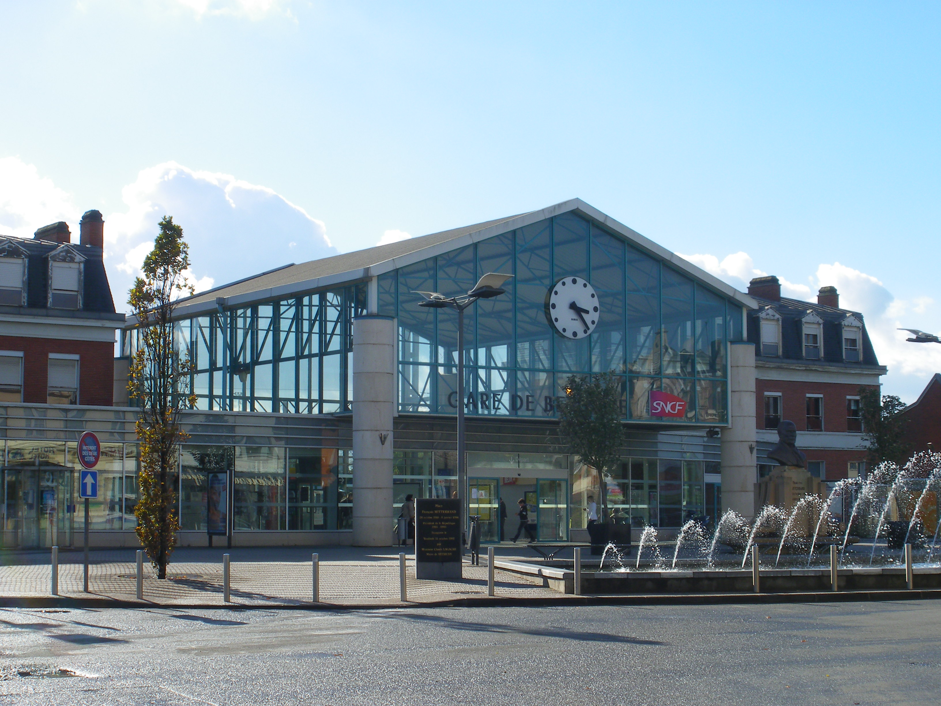 Vue du bâtiment principal de la gare de Béthune ainsi que de la place François Mitterrand. Le buste représentant cet ancien président de la République française est également visible.